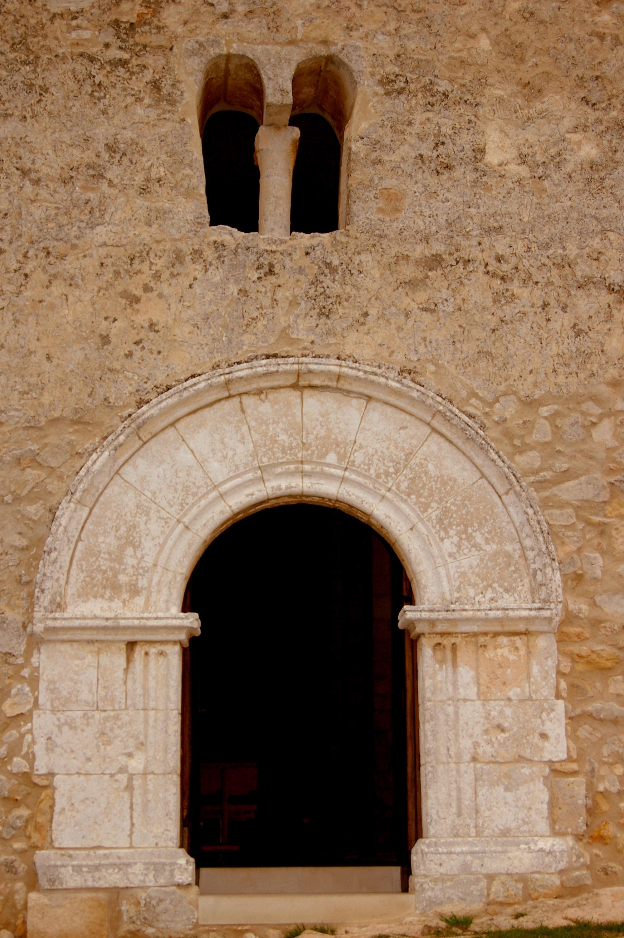 Església de Sant Miquel d'Olèrdola (Olèrdola)